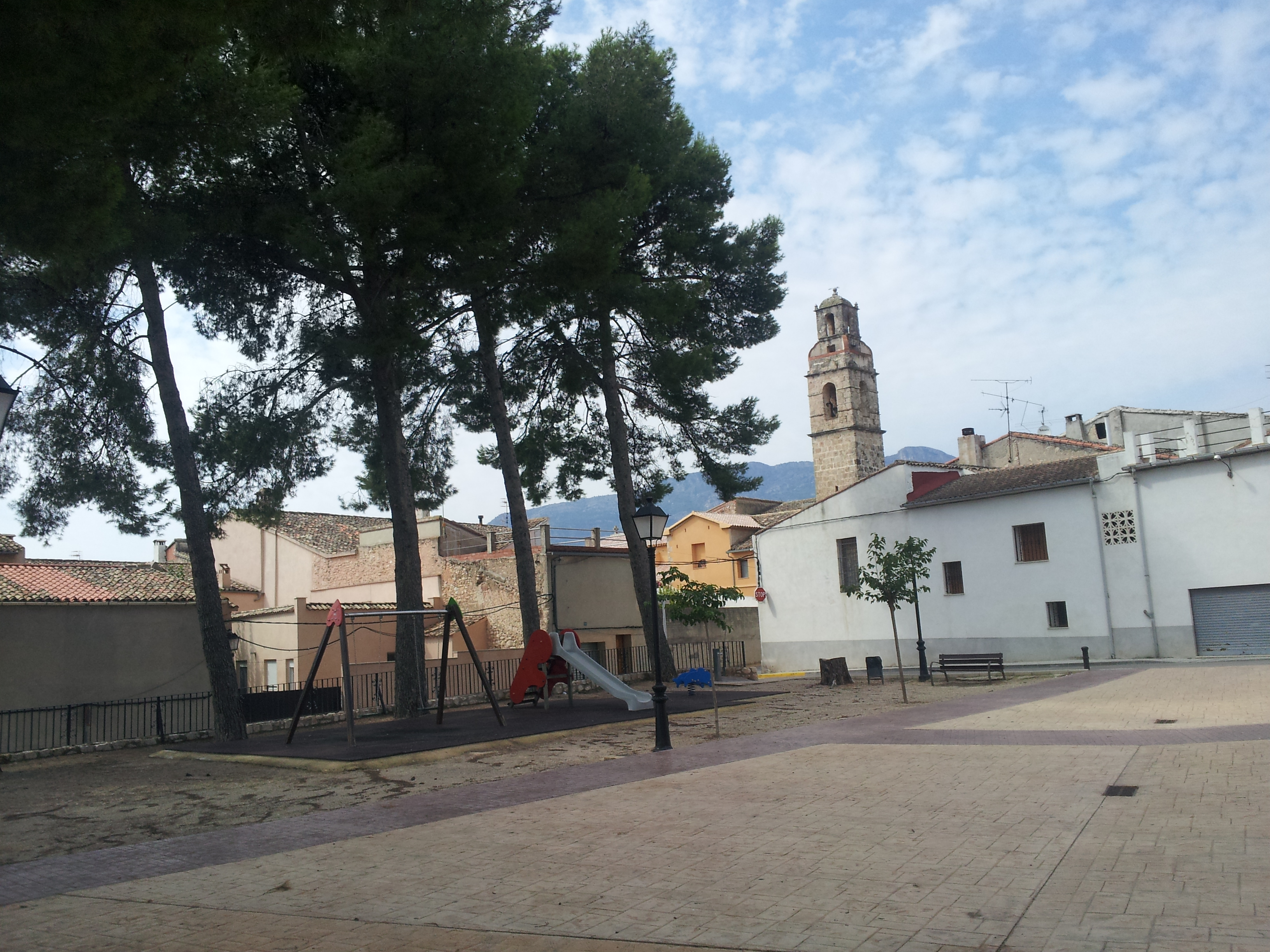 Setla de Nunyes.